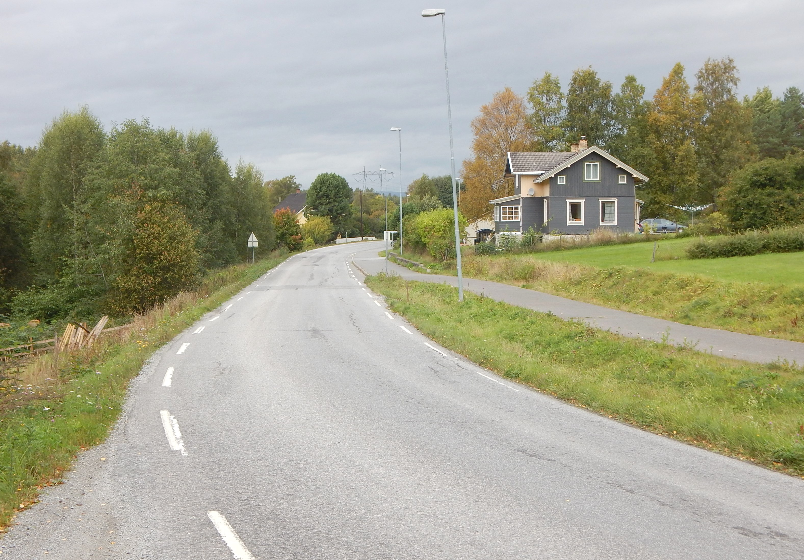 Klevbakken (fylkesvei 1836, tidl. 161)